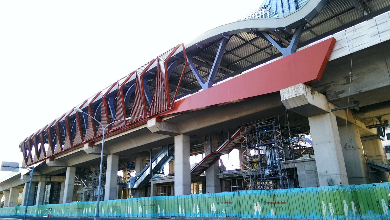 中文（台灣）: 太原車站高架站2014年11月興建工程